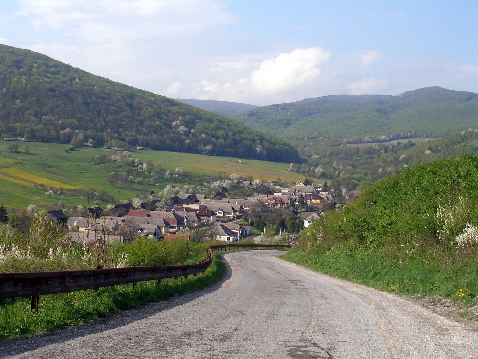 Obec Tuhrina okres Prešov región Šariš